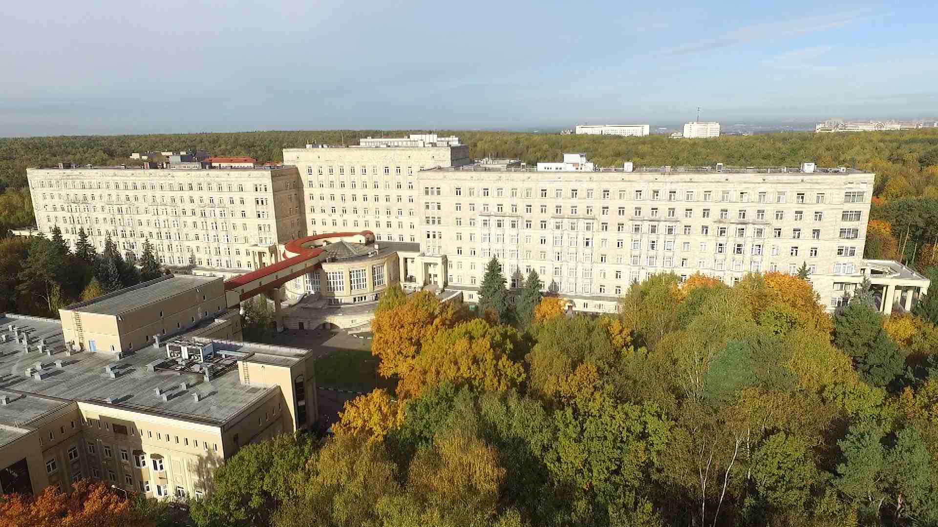 Главный и хирургический корпуса ЦКБ